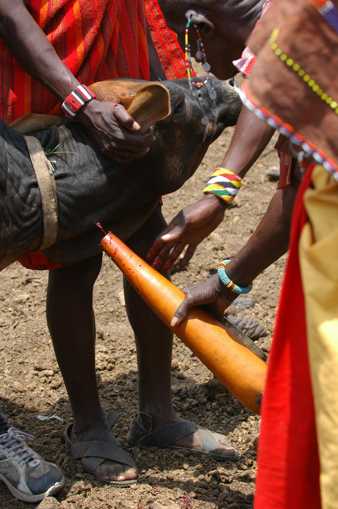 Das trinken von Rinderblut zu zeremoniellen Anlässen sowie dessen Beimischung zur alltäglichen Kost ist Bestandteil der Lebensweise der Massai. Zur Gewinnung des Blutes wird der Kopf des Rindes festgehalten und die zum Anschwellen gebrachte Halsvene angeritzt, das Rind überlebt dieses und wird anschließend verbunden.